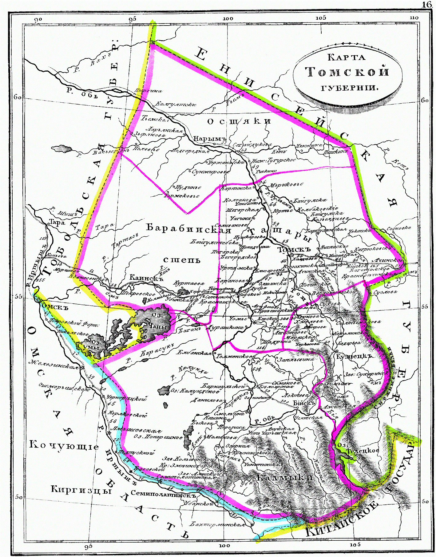 Карта Томской губернии, 1835